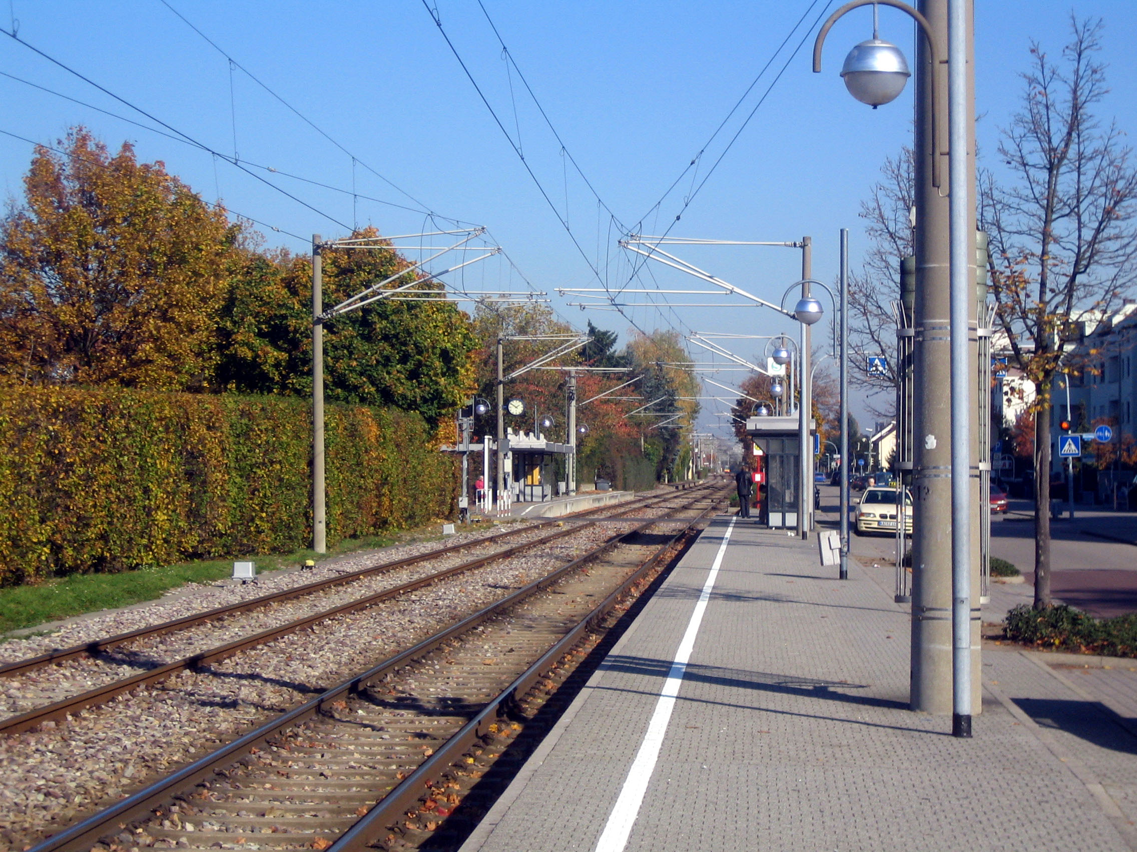 Beschreibung, Quelle und Lizenz Haltestelle, "Neureut Bärenweg", selbst fotografiert Licensing 18:08, 28. Okt 2005 Antifaschist 666 2272 x 1704 (1331015 Byte) (Haltestelle, "Neureut Bärenweg", selbst fotografiert)